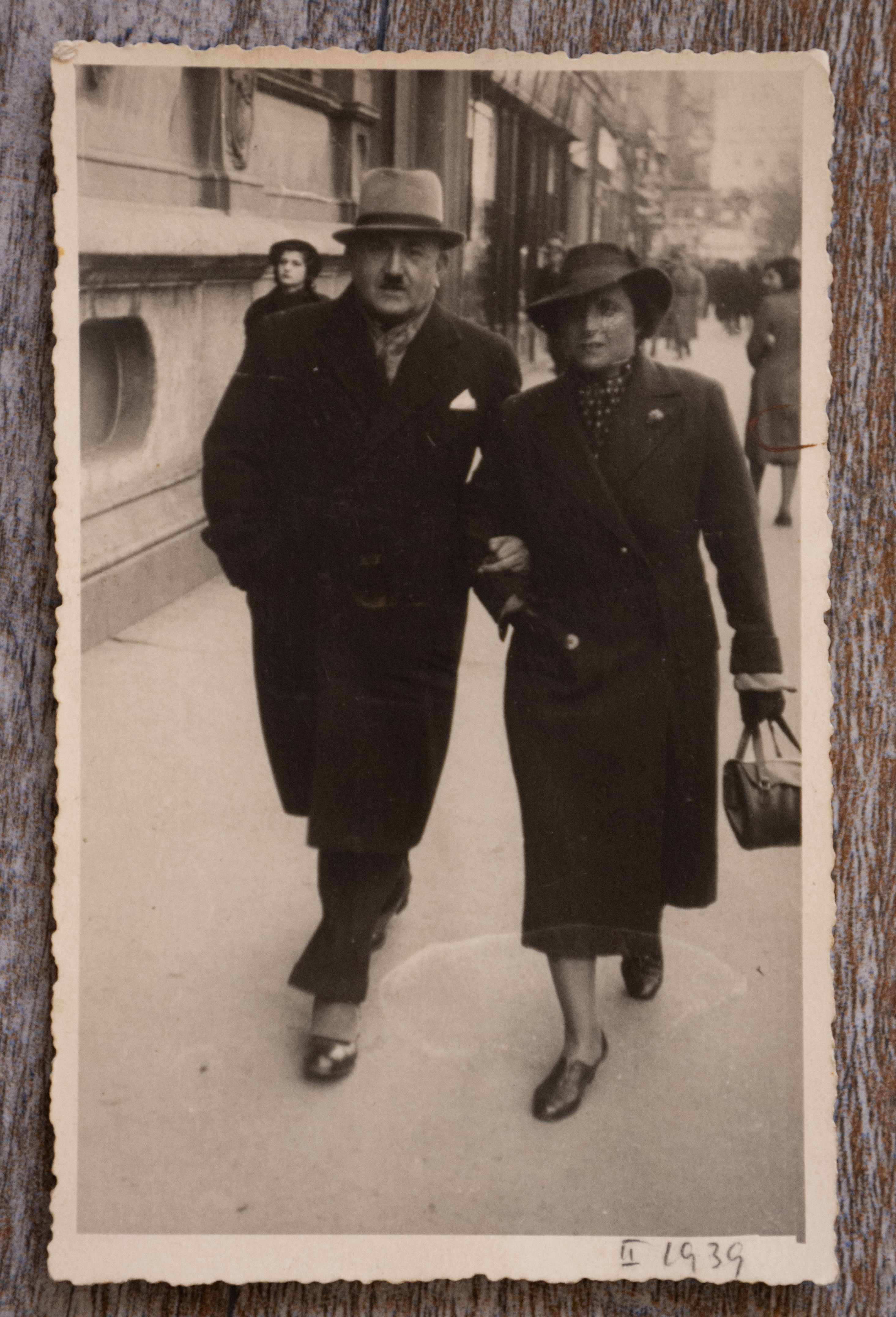 Bračni par dr Aleksandar i Smilja Kostić se vraća s posla, 1939.